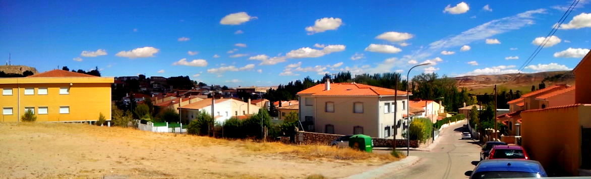 Vista de Huete, Castilla-La Mancha.